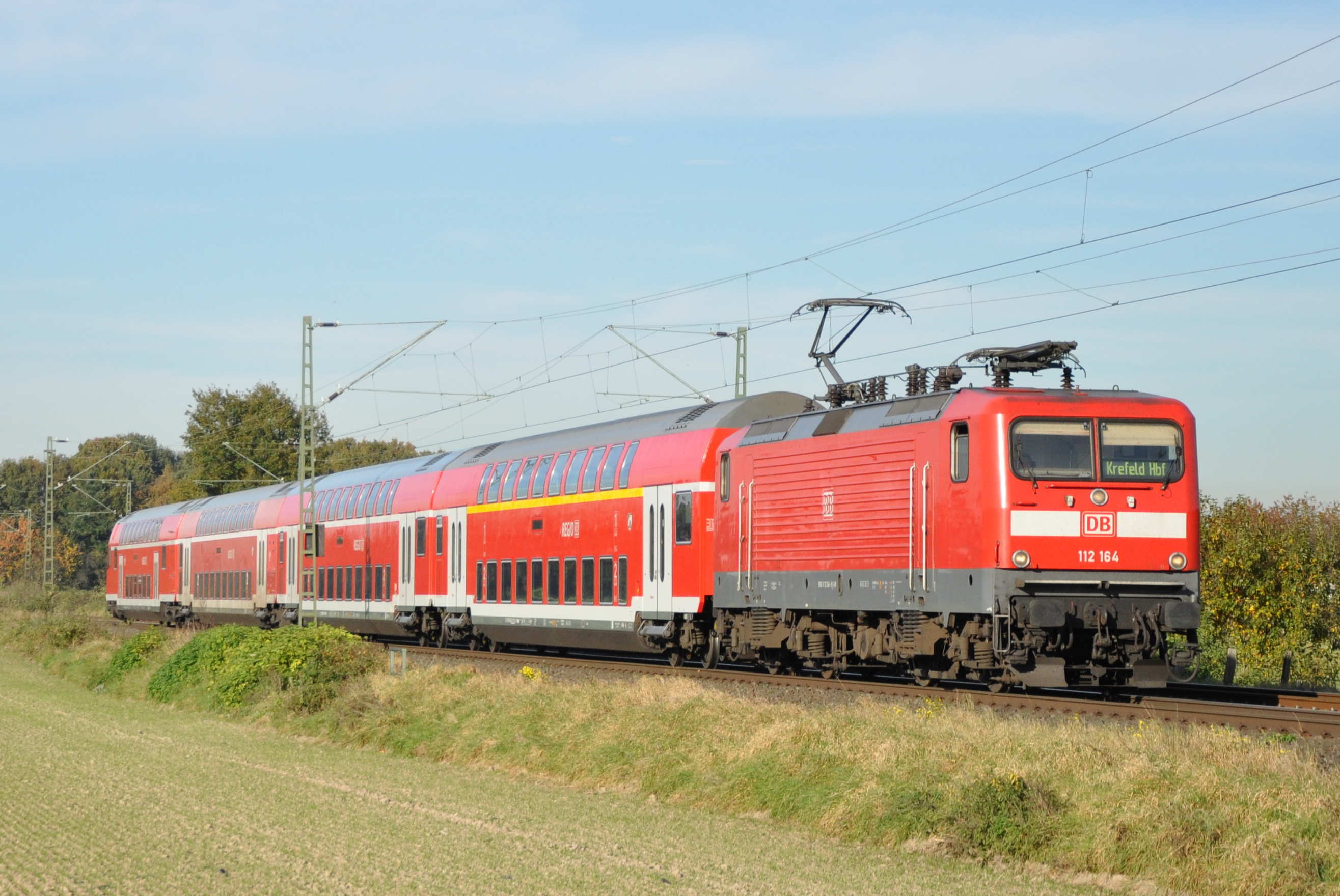 Baureihe 112 auf dem Rhein-Münsterland-Express kurz vor der Betriebsübernahme durch National Express